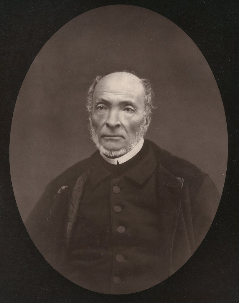 Victor Schoelcher photographié par Étienne Carjat [1], planche provenant de la Galerie contemporaine, littéraire, artistique, Paris, L. Baschet, 1876-1884.